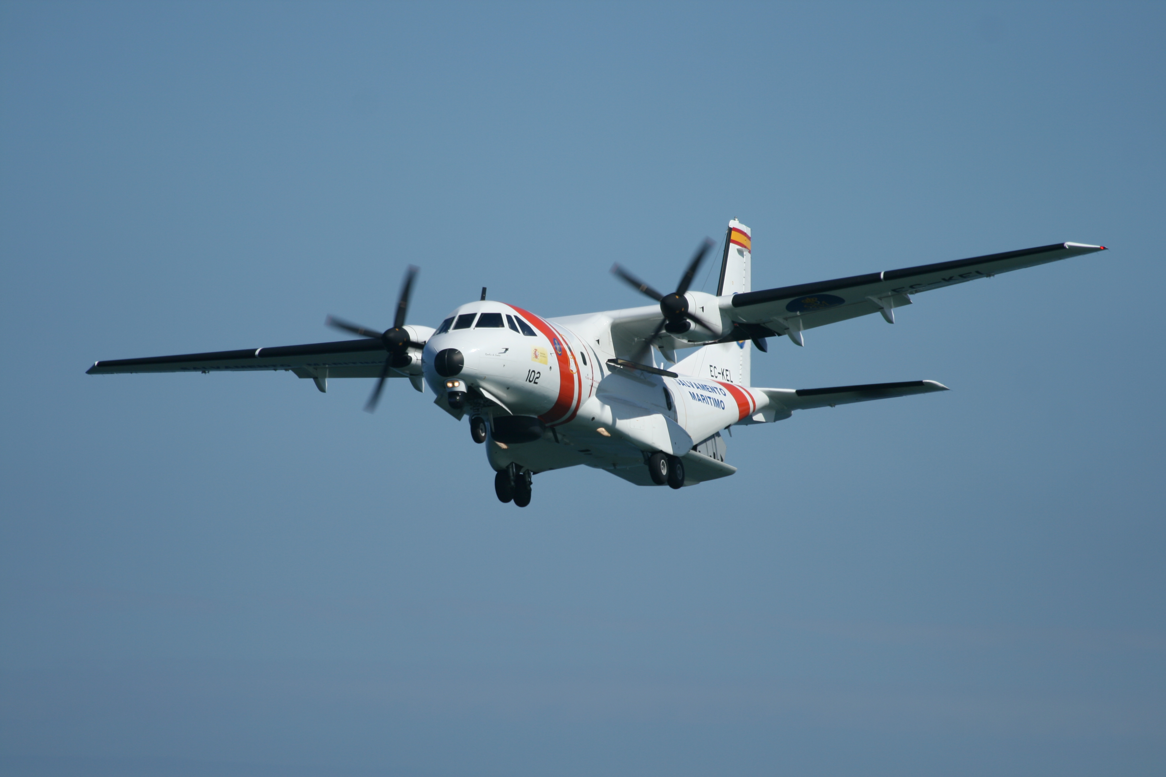 CASA CN-235-300 (EC-KEL "Rosalía de Castro") de Salvamento Marítimo del Ministerio de Fomento, con base en el Aeropuerto de Lavacolla (Santiago de Compostela), durante el Festival Aéreo de Vigo (Galicia, España) CASA CN-235-300 of Maritime Rescue. CASA CN-235-300 (EC-KEL " Rosalía de Castro ") of Maritime Rescue of the spanish Department of Promotion, with base in Lavacolla's Airport (Santiago de Compostela), during the Air Festival of Vigo (Galicia, Spain)